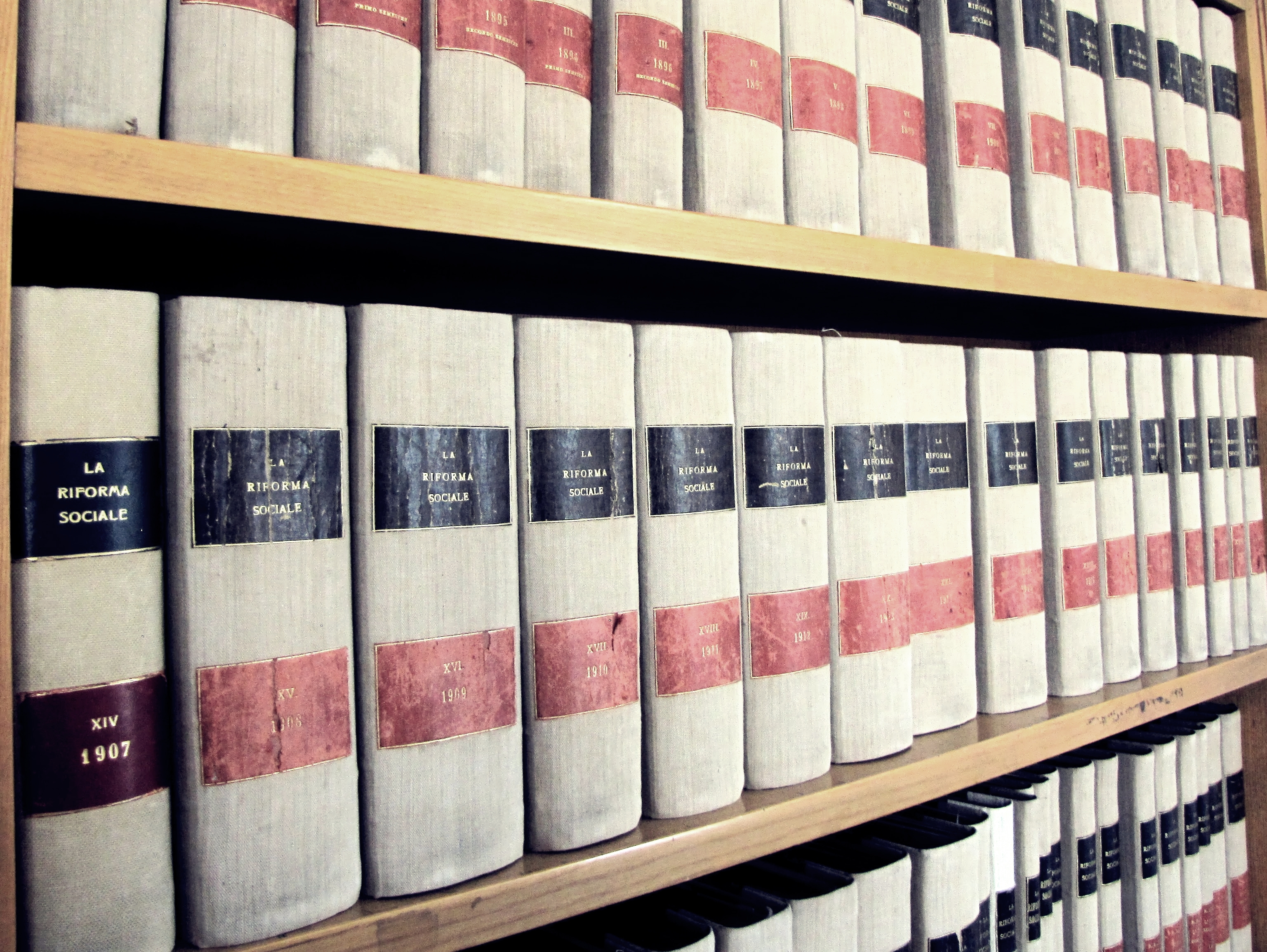 Collezione rilegata de "La Riforma sociale" posseduta dalla Fondazione Luigi Einaudi di Torino